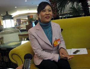 Hu Xiaoyan